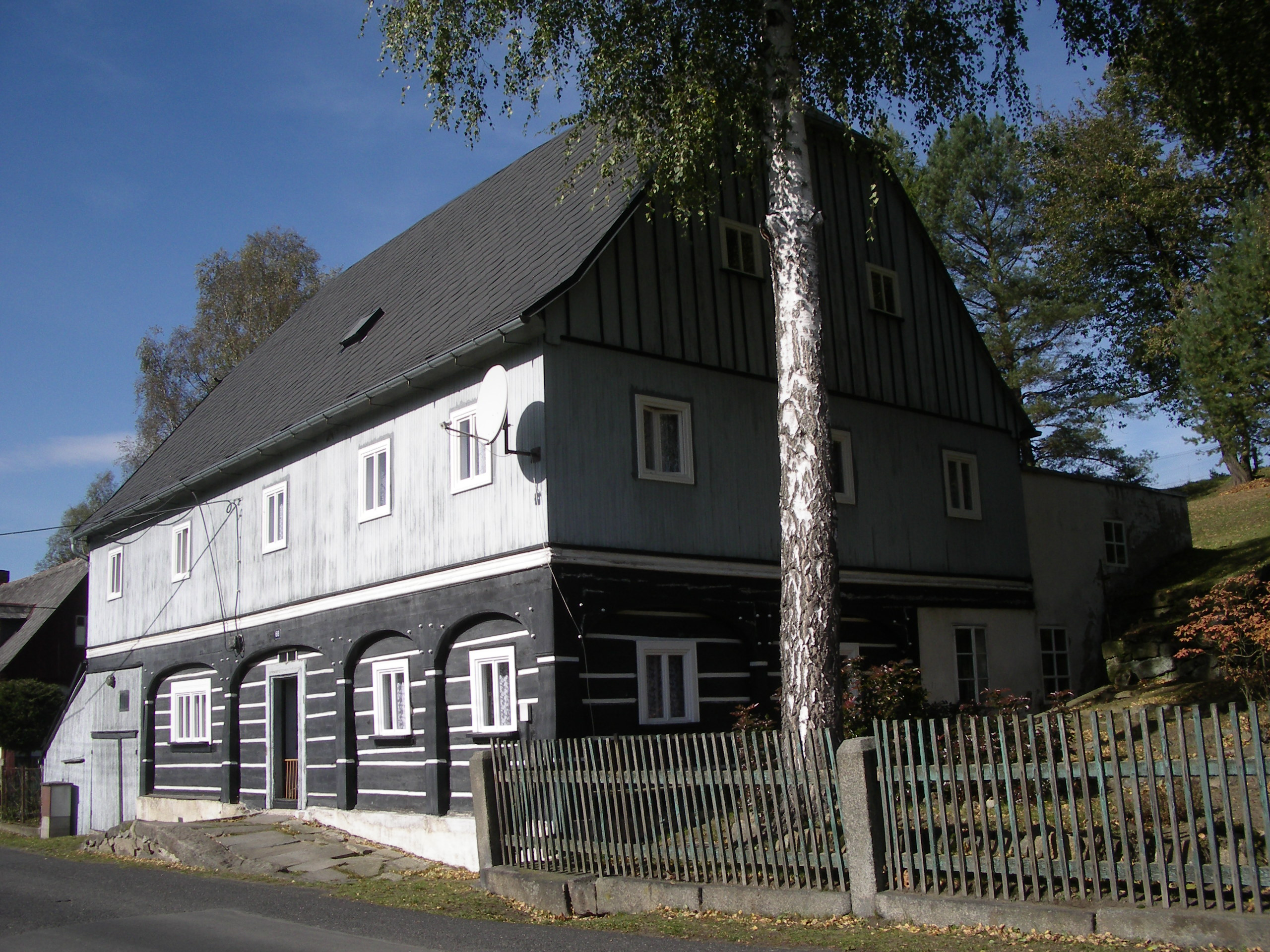 Umgebindehaus in Vilémov, (de: Wölmsdorf) im südlichen Lausitzer Bergland (Böhmisches Niederland).